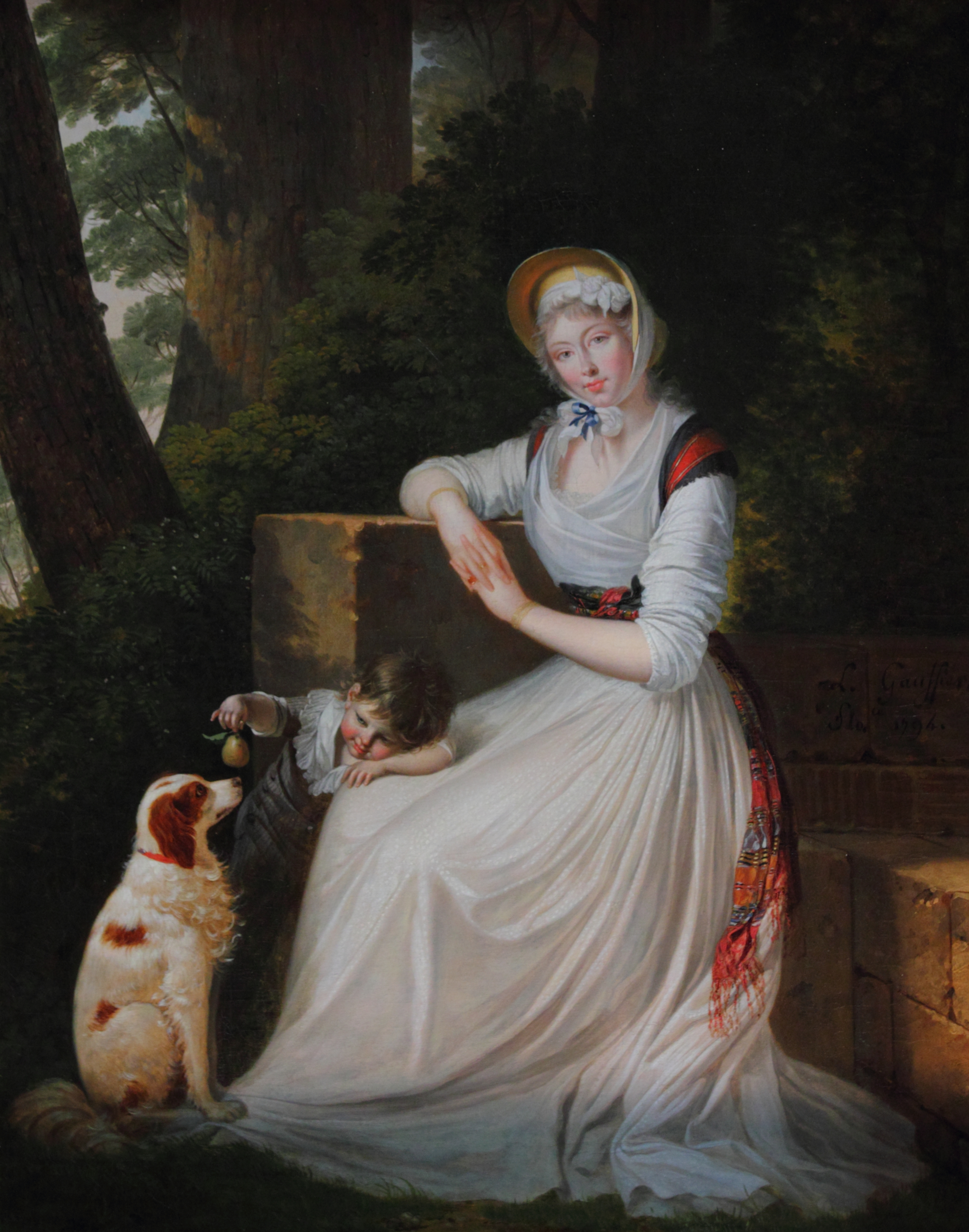 Aristocrate britannique exilée en Toscane, lady Webster, future épouse du baron Holland, était une familière du salon de la comtesse d'Albany à Florence